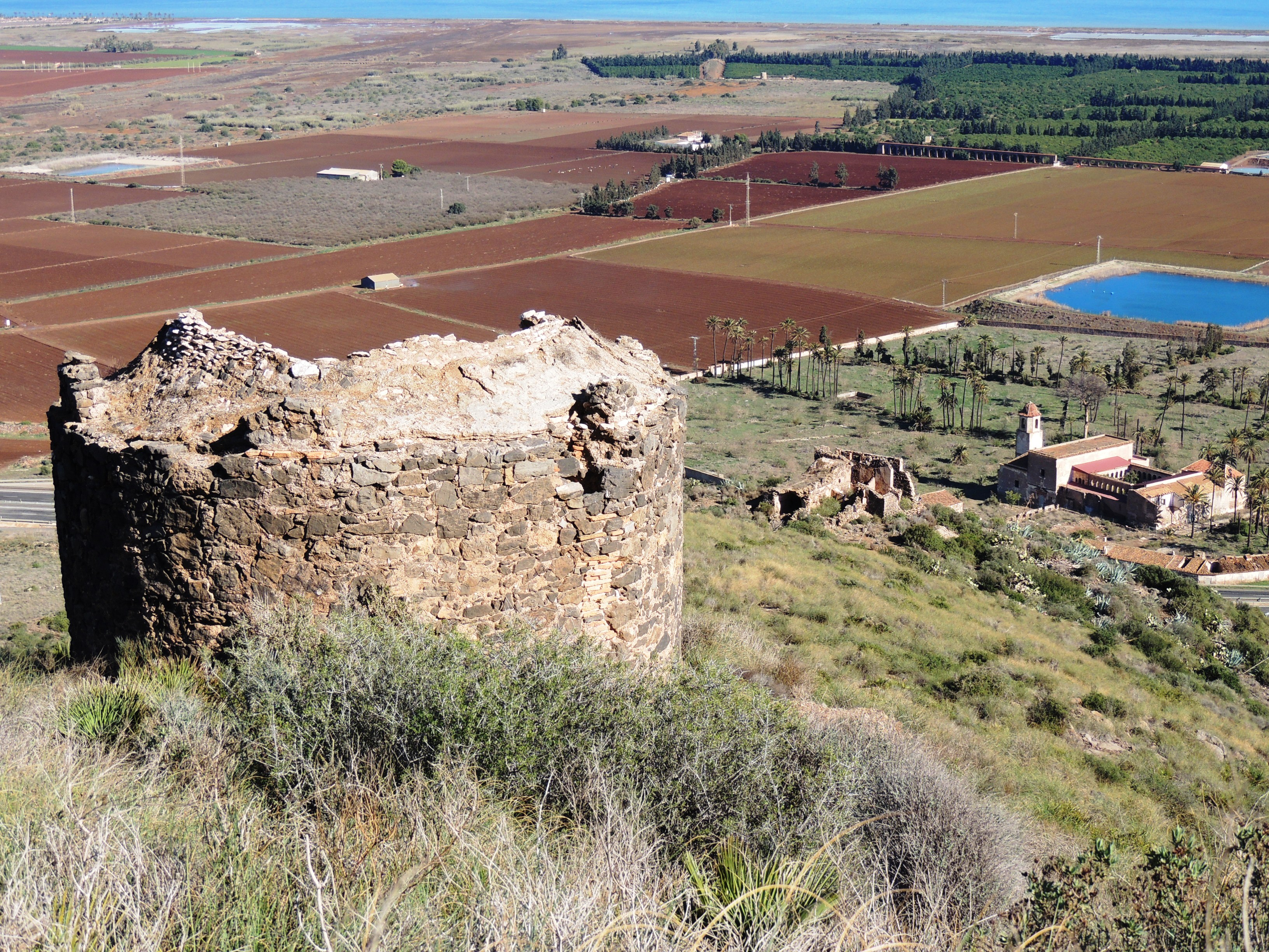 Tercera de las ermitas del Monte MIral en sentido ascendente.